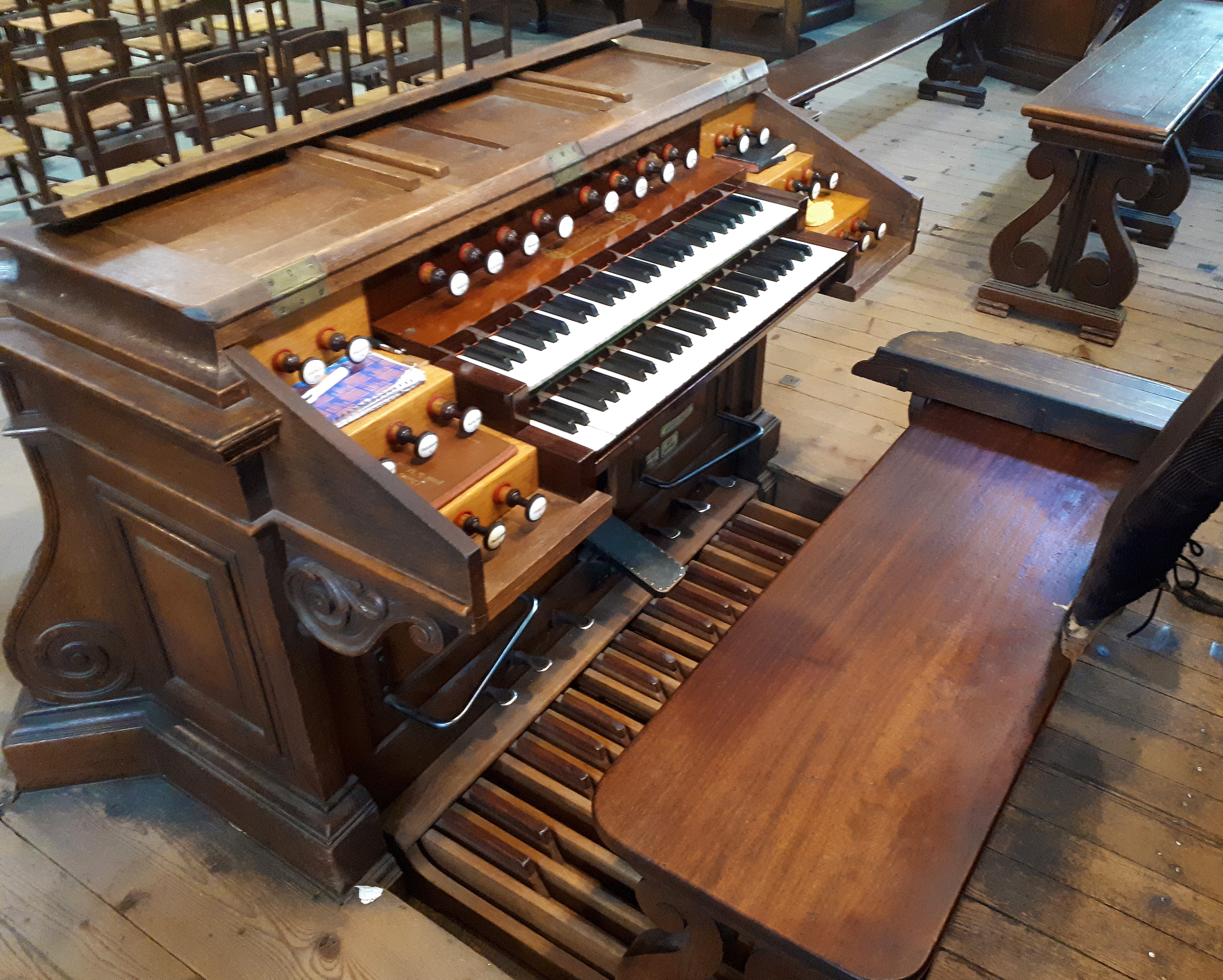 La consolle